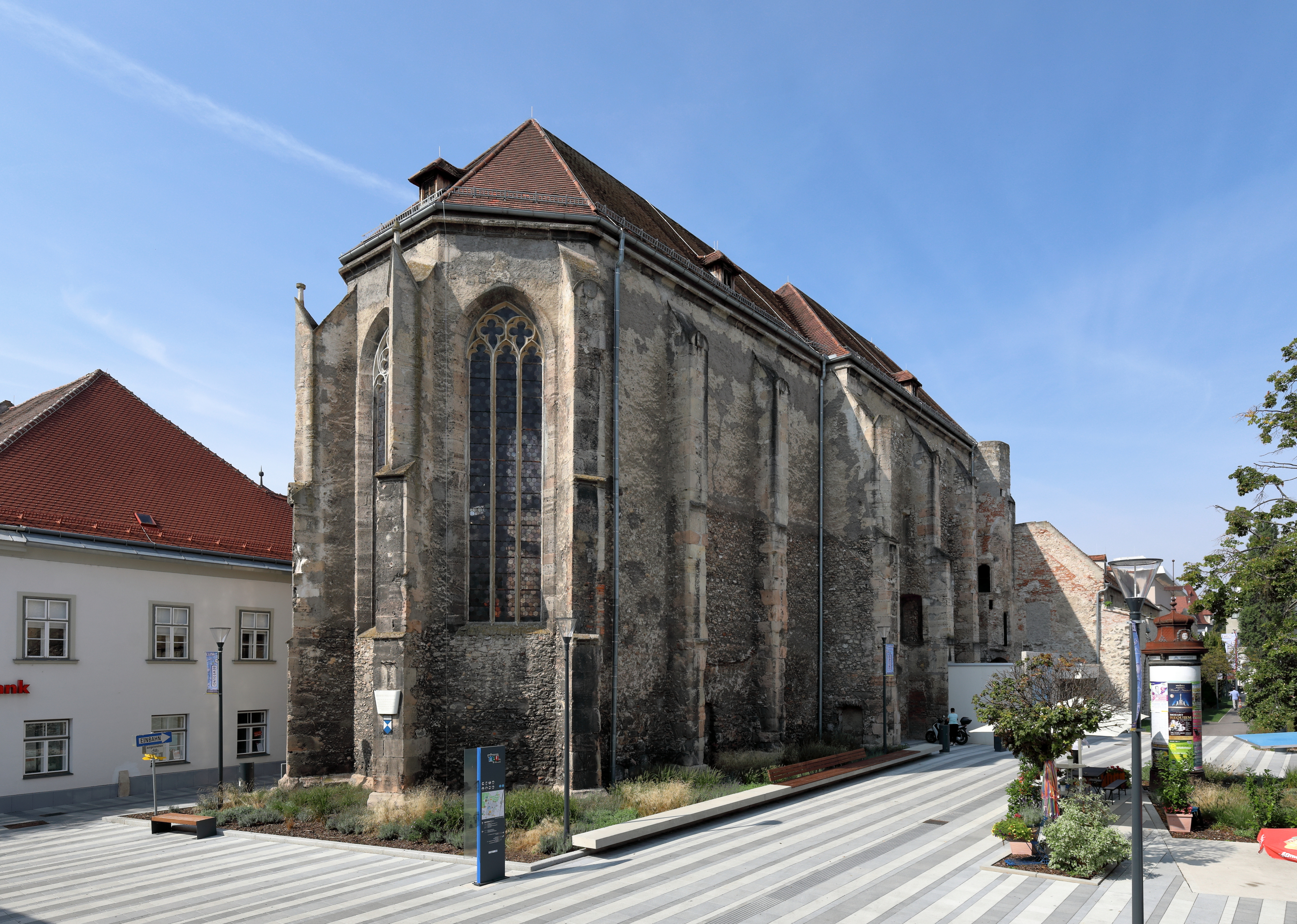 Ostnordostansicht der ehemaligen Klosterkirche der Dominikanerinnen „St. Peter an der Sperr“ in der niederösterreichischen Bezirkshauptstadt Wiener Neustadt.Die Kirche wurde im 3. Viertel des 14. Jahrhunderts errichtet. 1768 wurde sie bei einem Erdbeben stark beschädigt. In weiterer Folge wurde die Kirche geschlossen und profaniert. Weitere Beschädigung erfolgten beim Stadtbrand 1834, wo das Gewölbe einstürzte, und 1944 durch Bombentreffer. 1965/66 wurde die ehemalige Kirche nach Plänen von Wilhelm Zotti restauriert und als Ausstellungshalle adaptiert.